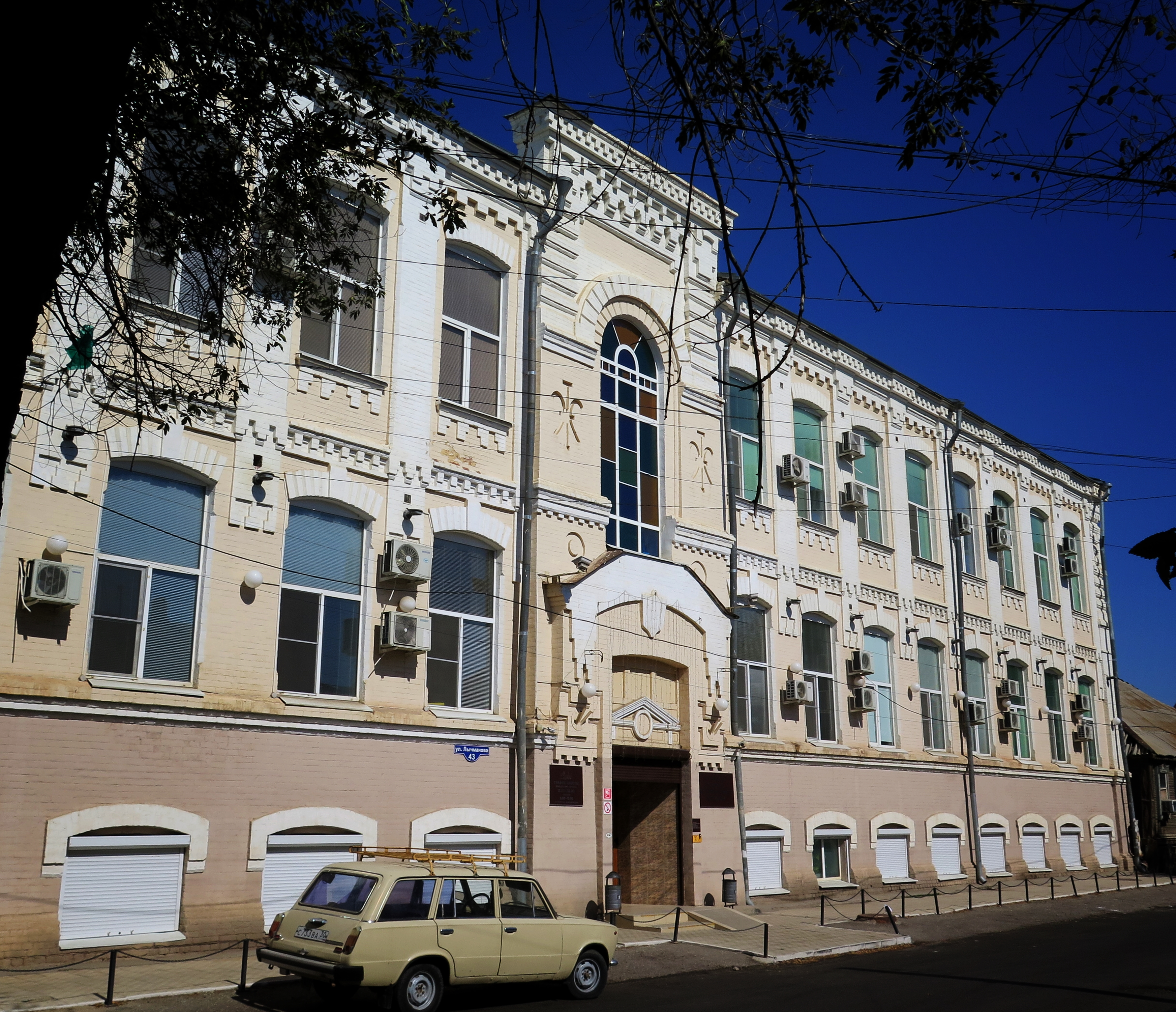 Ирининская община сестер милосердия (армянское епархиальное женское училище): улица Мечникова, 25 / улица Бебеля, 40,42 / улица Лычманова, 41,43, Астрахань, Астраханская область